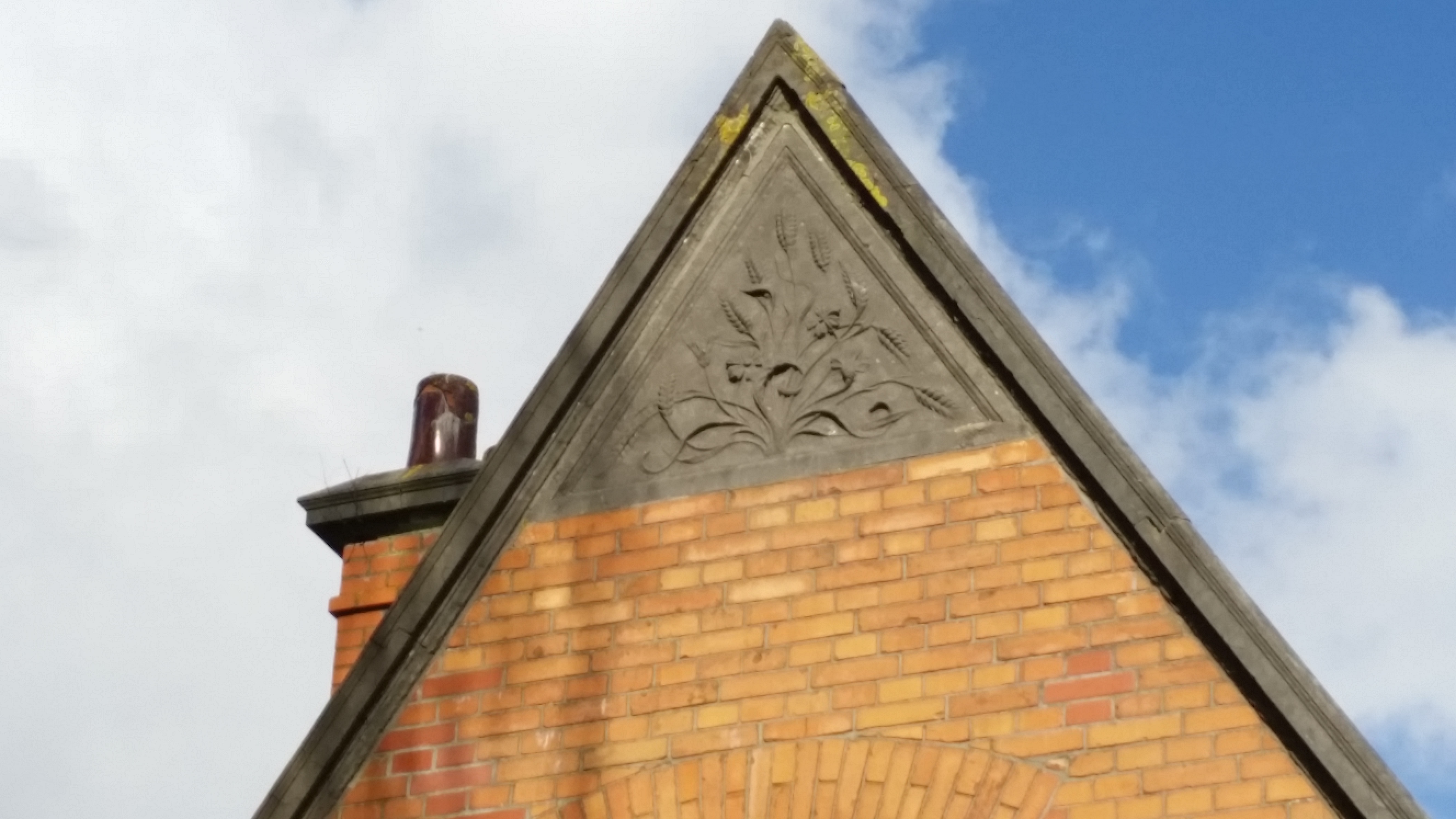 Impressie van de dienstwoningen op het terrein van De Nieuwe Ooster, Watergraafsmeer, Amsterdam; rijksmonument. (maart 2020)